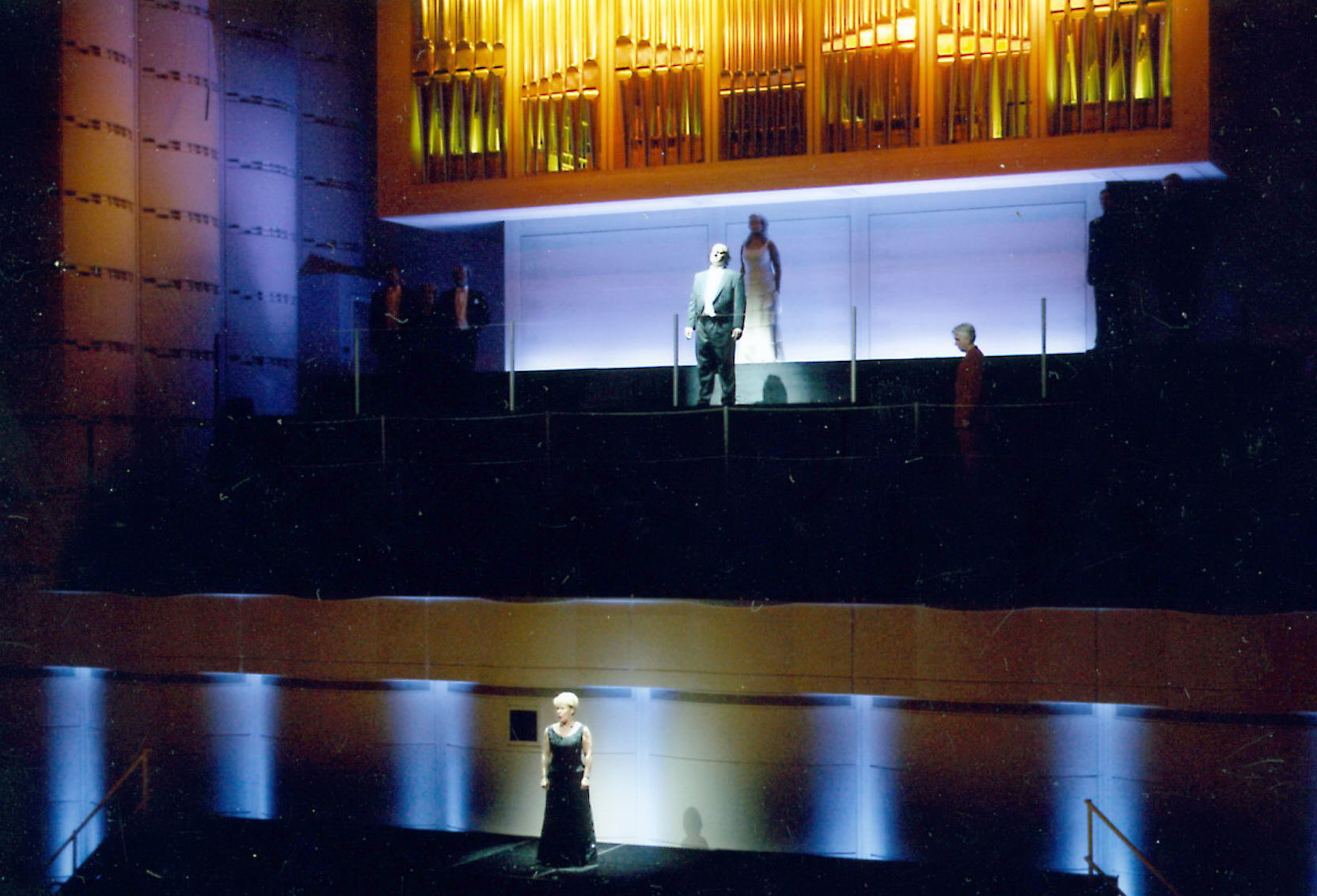 Konzerthaus Dortmund mit Orgelbühne zum Ring des Nibelungen